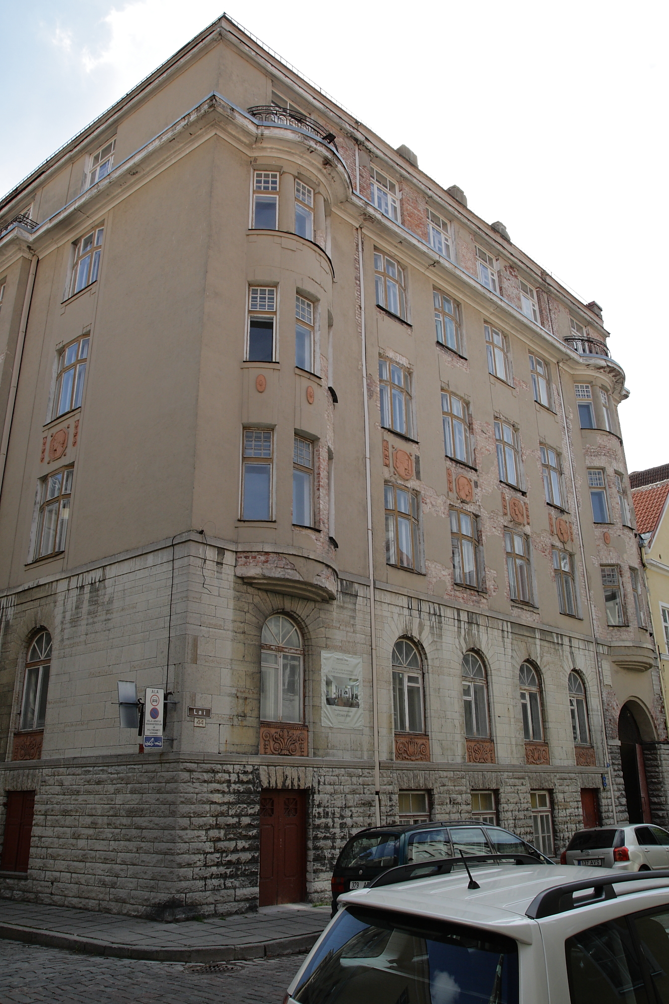 Tallinn, hoone, kus on paiknenud Eesti riigikaitseasutused ja võõrvõimude julgeolekuorganid